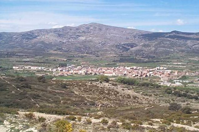 Image del poble de Catí, a Castelló (Espanya)